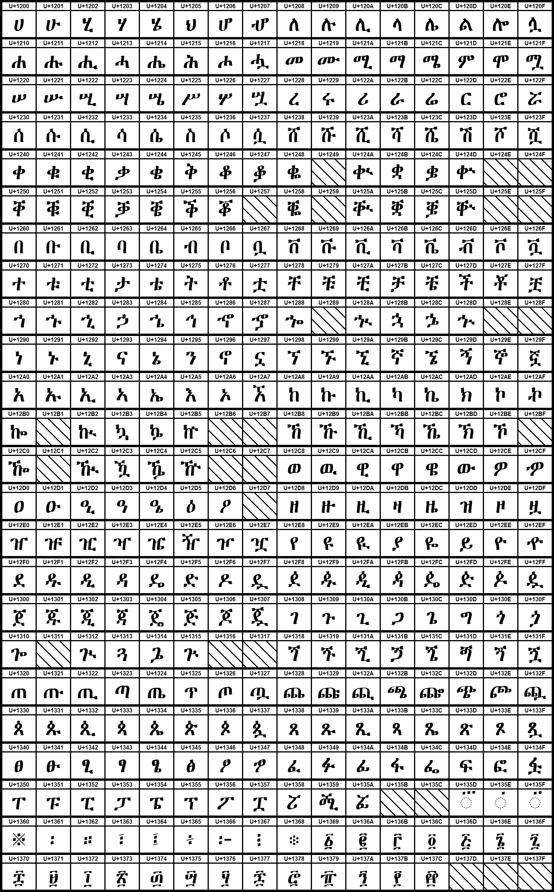 Grafiktafel für den Unicodeblock Äthiopisch. Schraffierte Felder sind unbesetzte Codepoints.